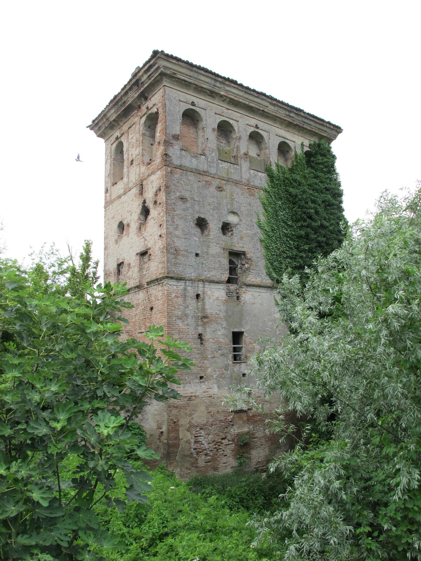 Torre delle Acque di Colorno, lato Nord est